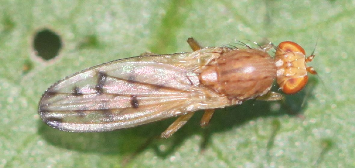 Gelbe Getreidefliege (Opomyza florum) am 27.9.2016 in der Schwetzinger Hardt